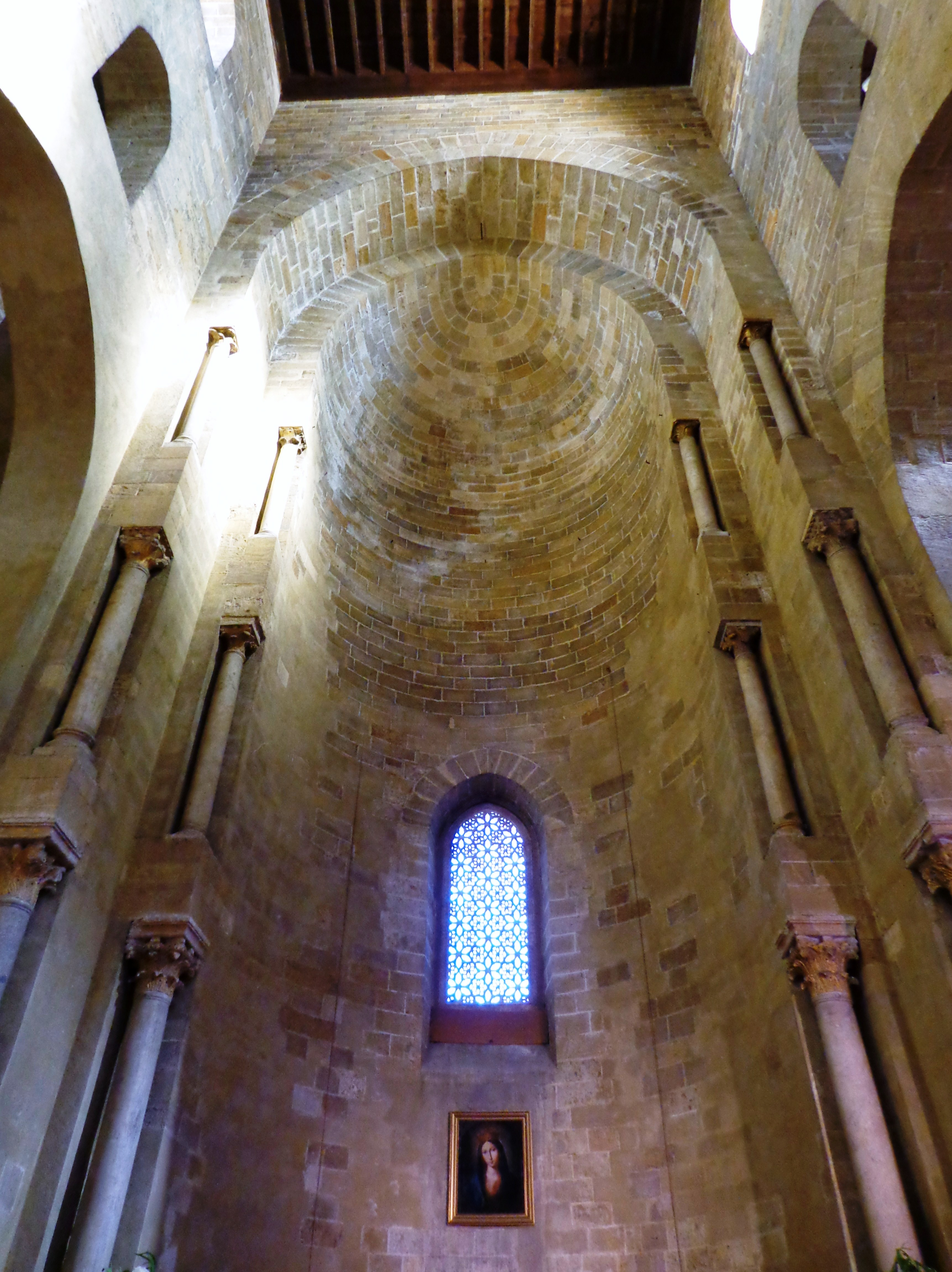 Chiesa_Cancelliere_07